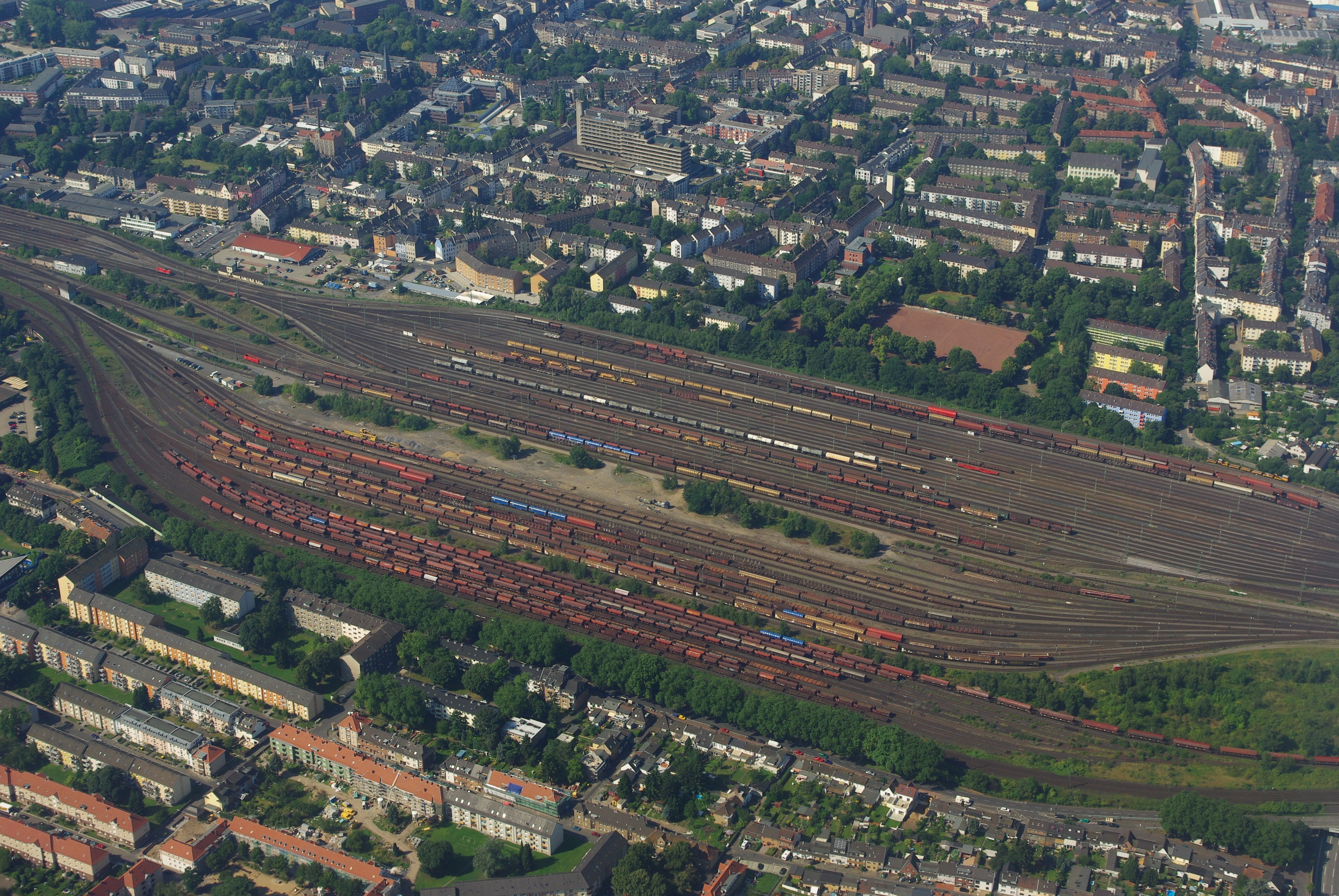 04.08.09 Inflight Rangierbahnhof Köln-Kalk